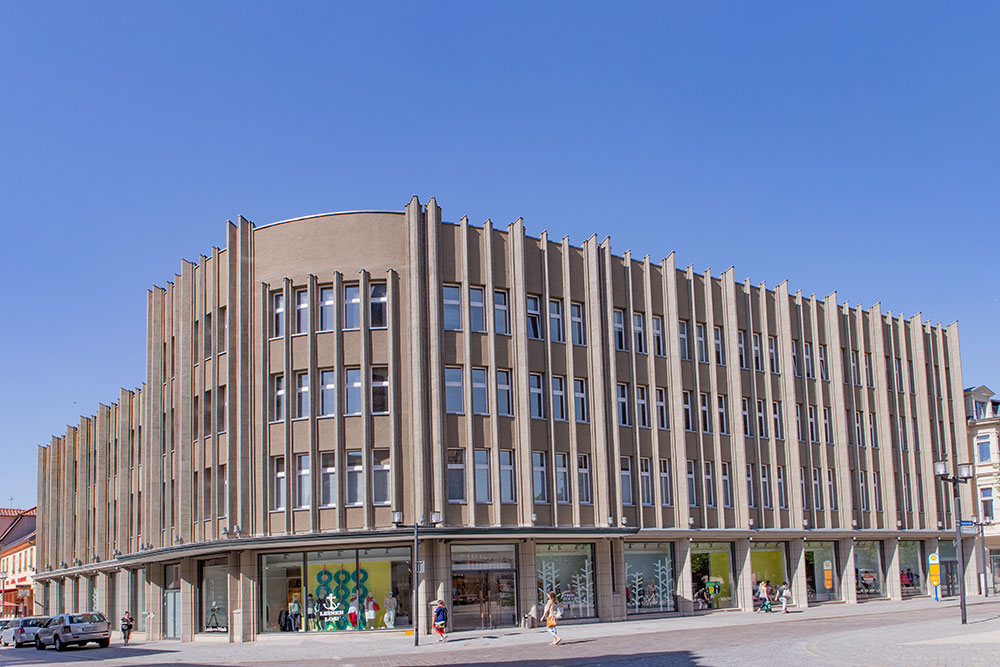 Stendal Breite Straße 20/21, Ecke Bruchstraße, Winckelmannplatz, Kaufhaus Ramelow, Baudenkmal